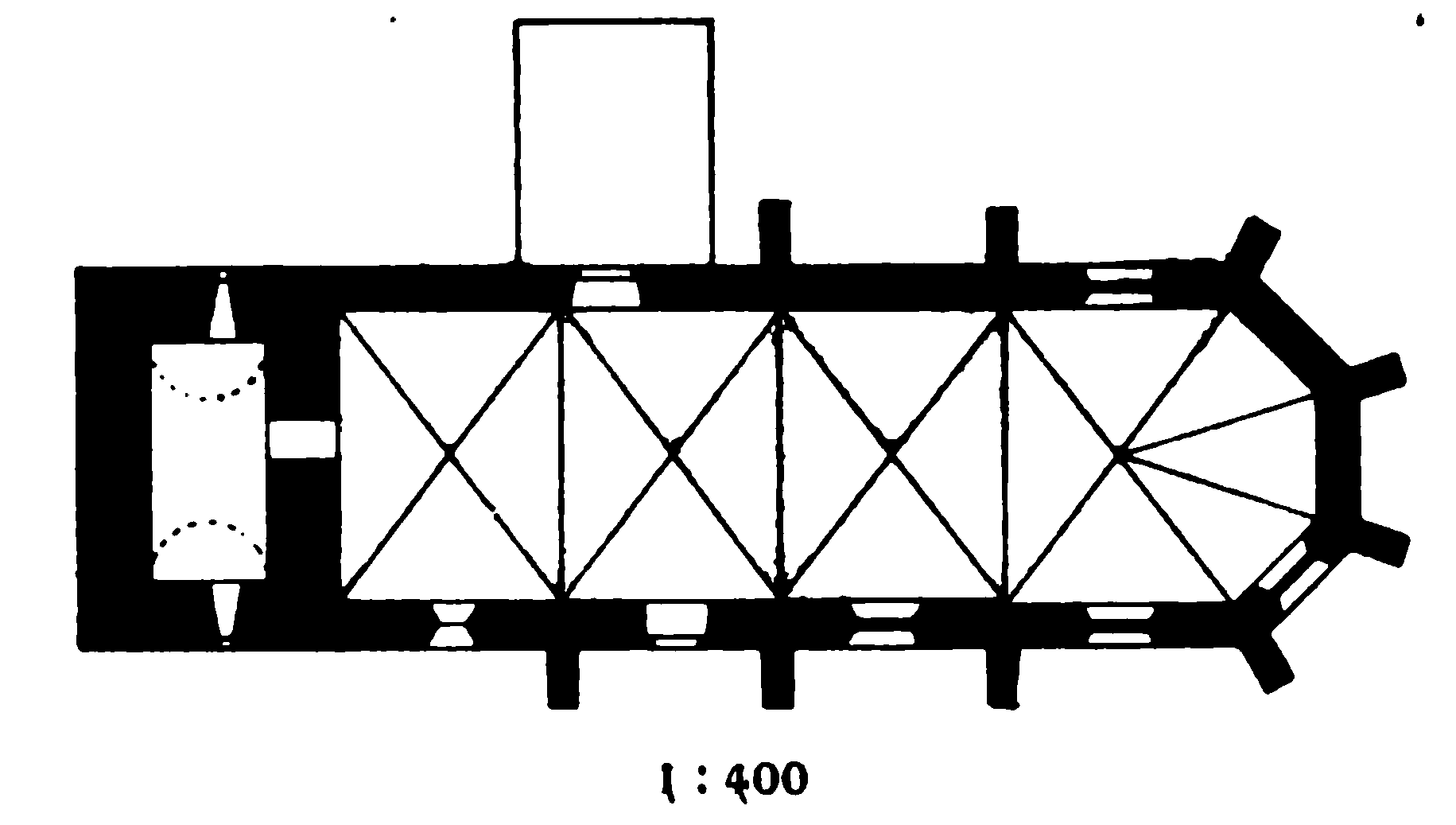 Grundriss der Ev. Kirche in Holtrup, Stadt Porta Westfalica